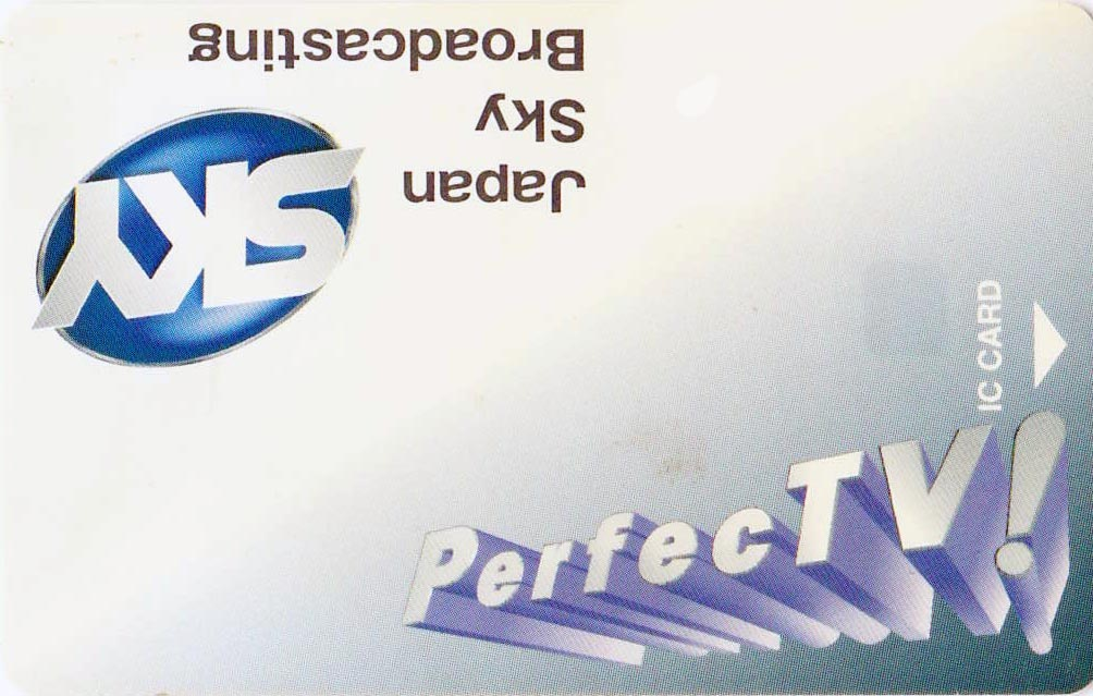 1999年に購入したチューナ(DST-MS9)に付いていたカード